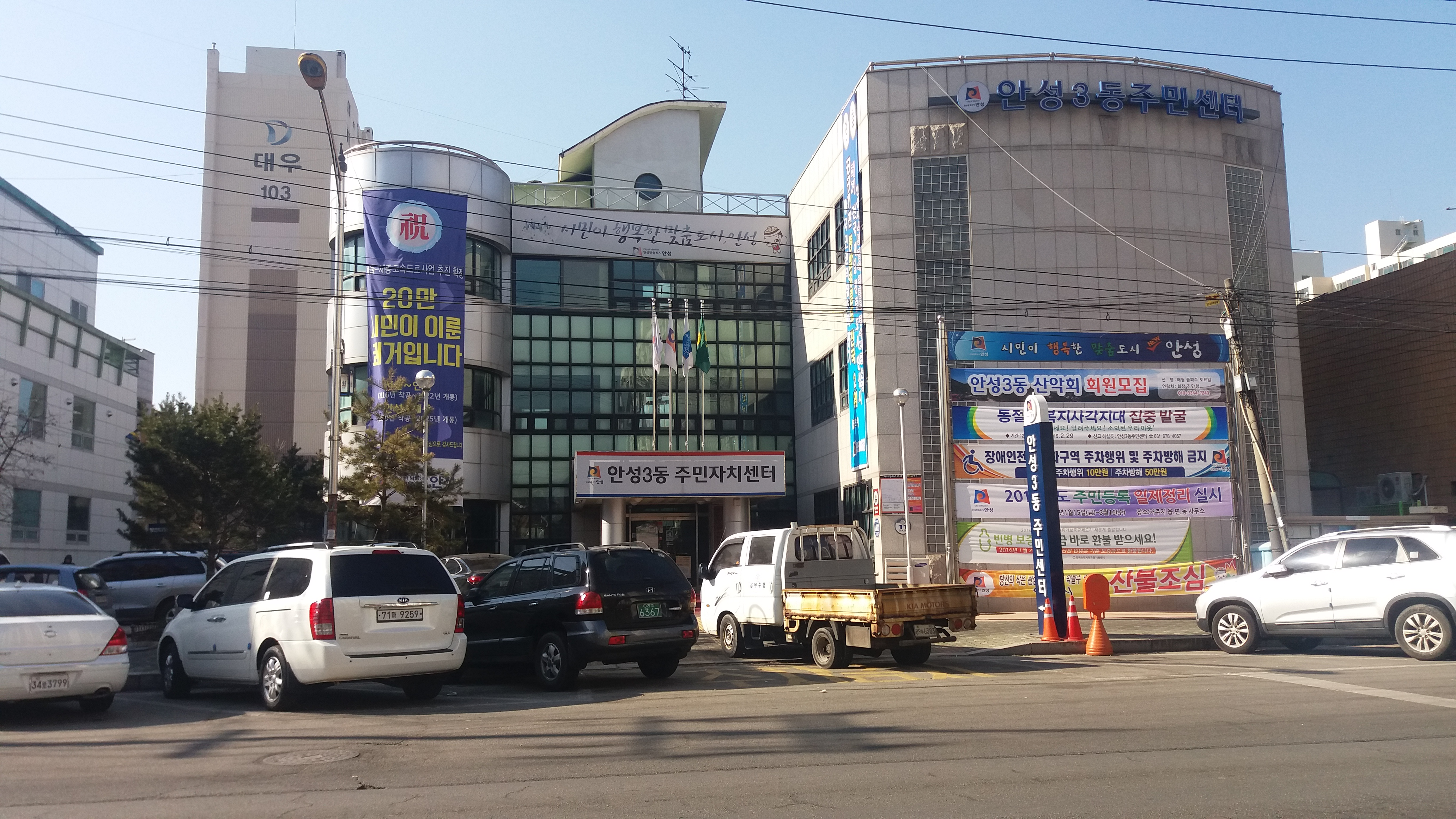 안성3동사무소